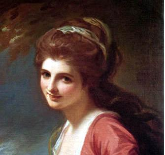 cropped